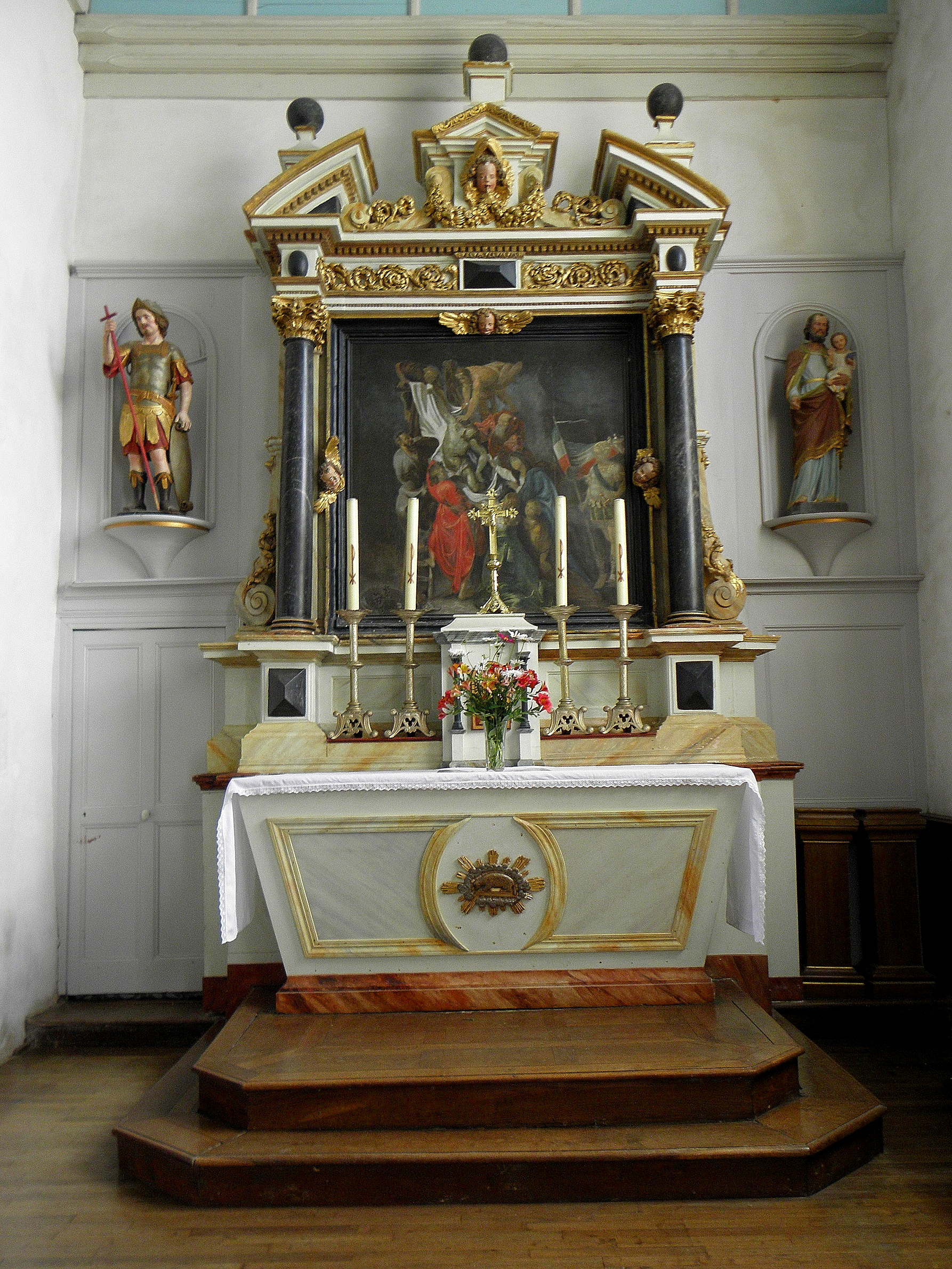 Autel et retable sud de l'église Saint-Martin de Moutiers (35).